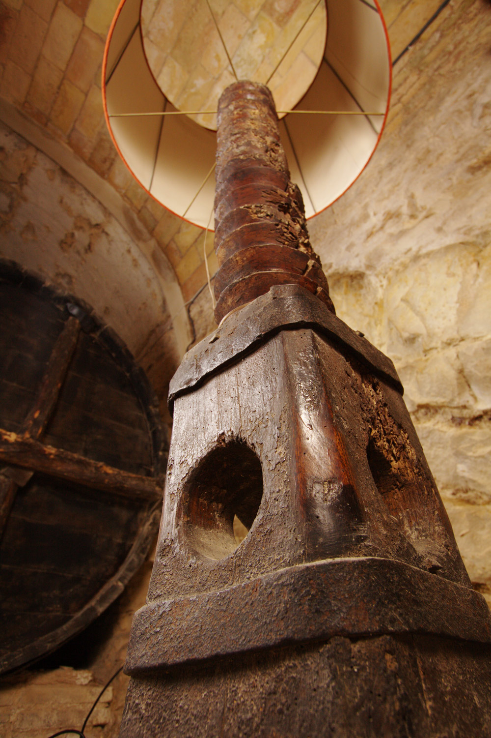 Prensa reconvertida en lámpara en la bodega del Palacio de los Mencos en Tafalla (Navarra).